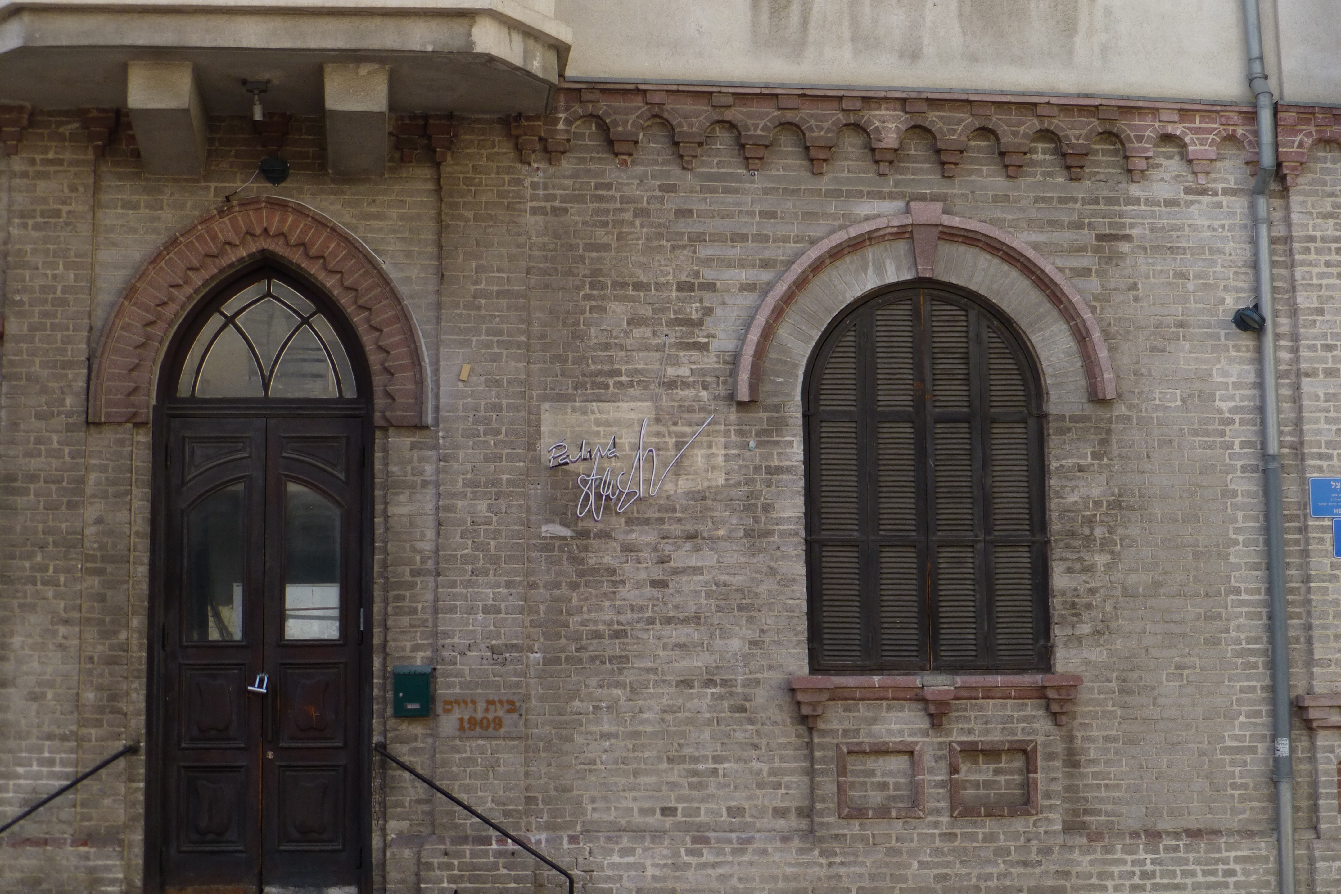 בית וייס הוא מבנה בפינת הרחובות הרצל ואחד העם בתל אביב-יפו, שהיה שייך במקור לעקיבא אריה ויס האב המייסד של תל אביב ויושב ראש הראשון של אחוזת בית. בנייתו החלה בשנת 1909 והסתיימה בשנת 1910. בתחילה היה הבית בן קומה אחת שבה שישה חדרים ועליית גג, ובשנת 1927 נוספה לו קומה נוספת.